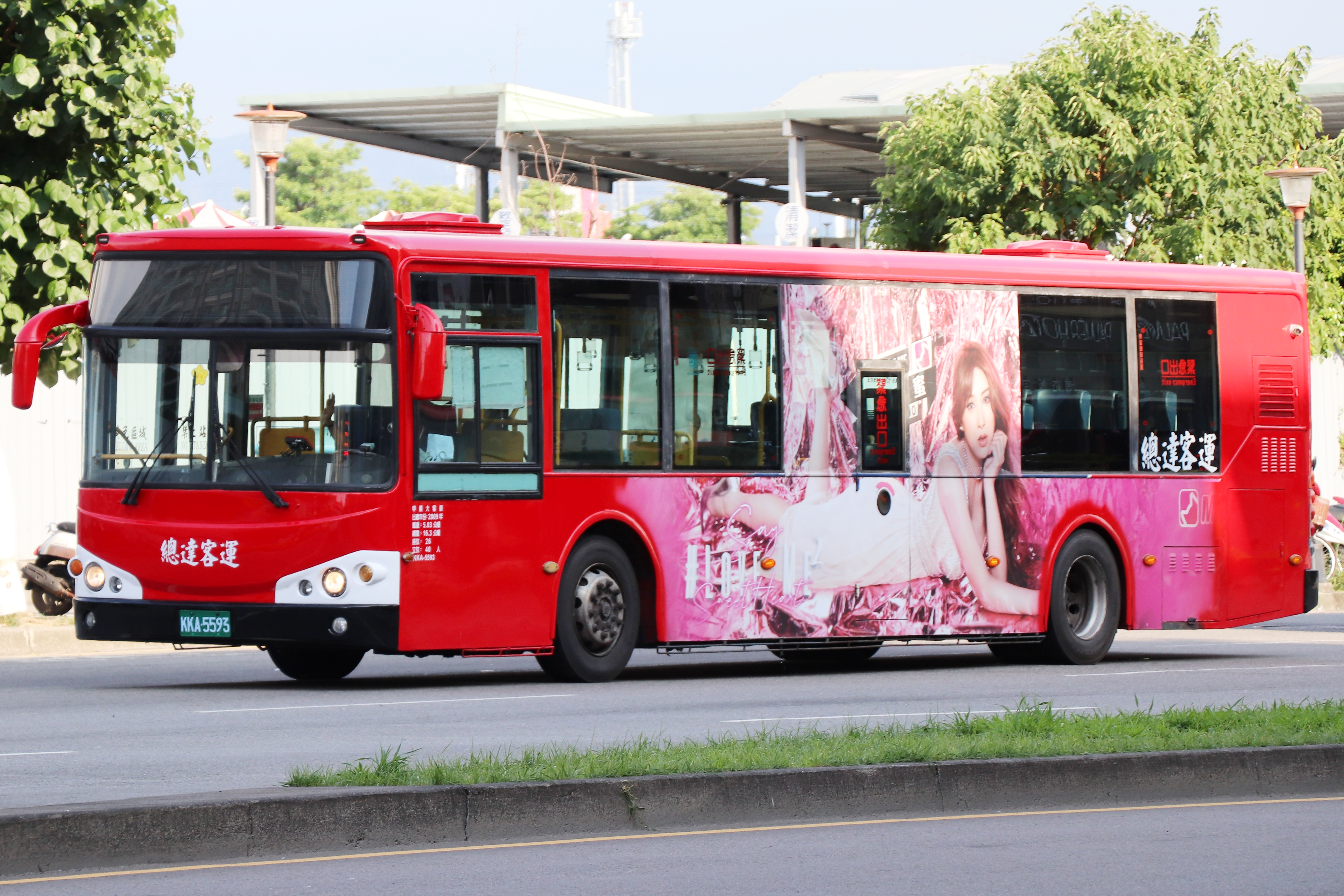 總達客運 中興金龍KL6120U1大客車 KKA-5593